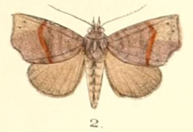 Thalatta fasciosa Moore 1882